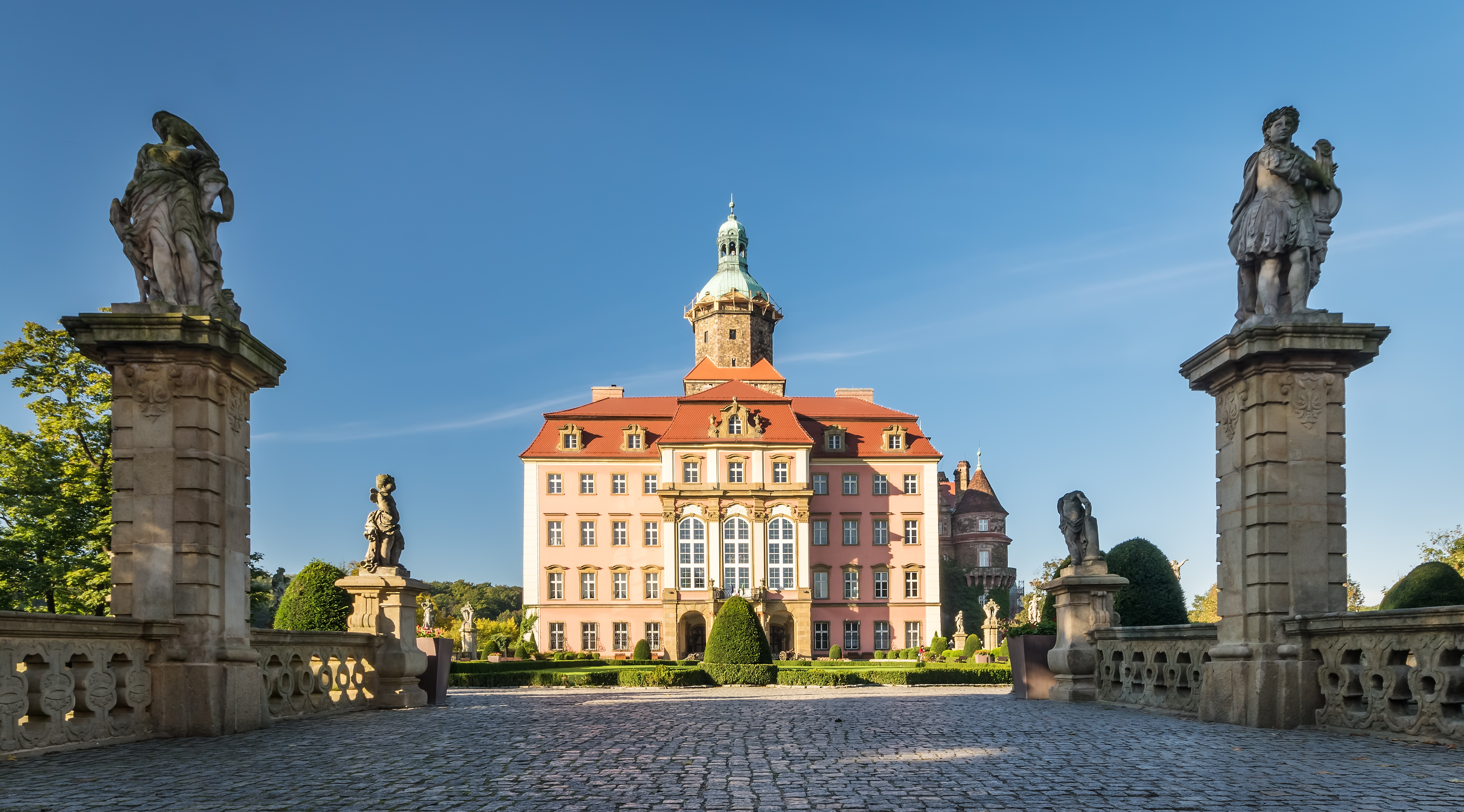 Wałbrzych, zespół rezydencjonalny Książ